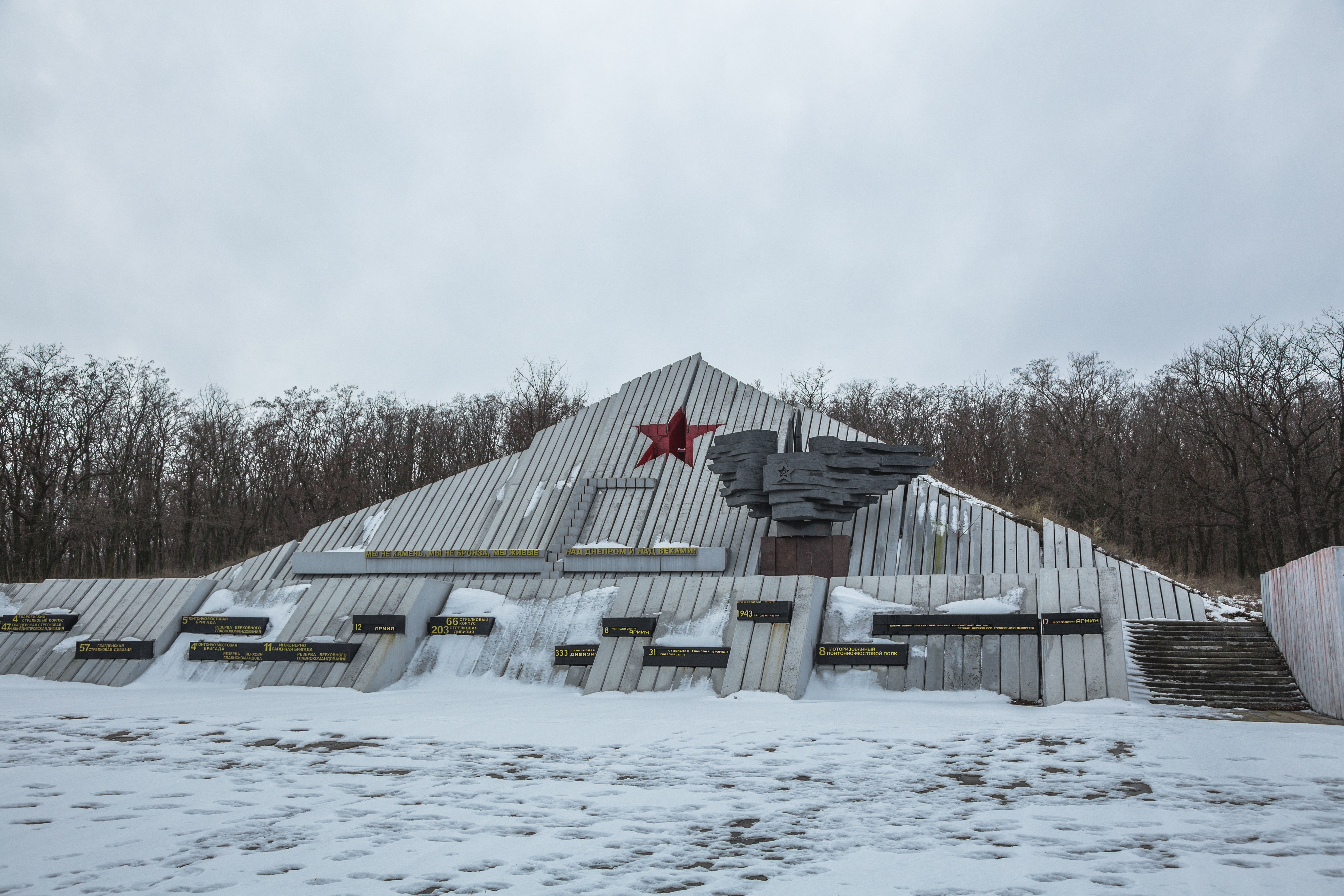 Меморіальний комплекс «Дніпровський плацдарм» в селі Військове